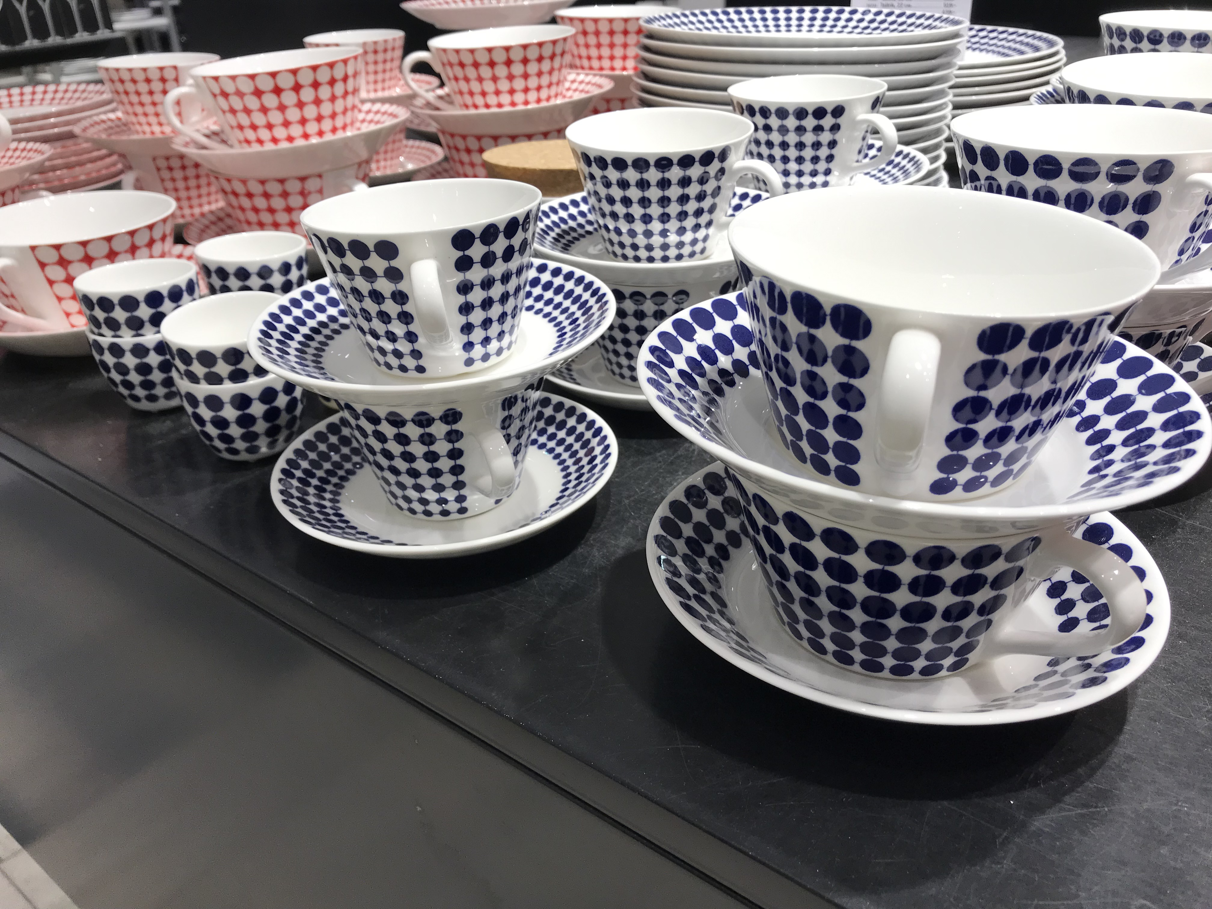 Porslinsserviserna Eva i rött och Adam i blått från Gustavsberg, båda formgivna av Stig Lindberg.